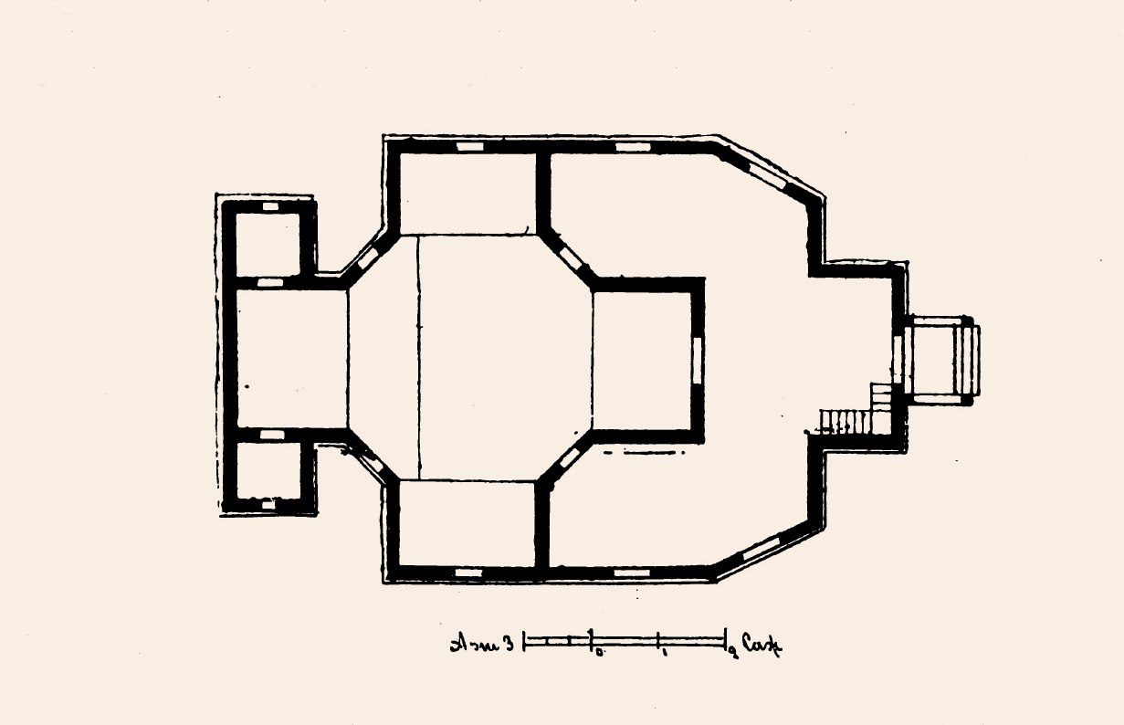 Беларуская (тарашкевіца): Віцебск (Viciebsk), Пескавацік (Pieskavacik), вуліца Траецкая (vulica Trajeckaja). Царква Сьвятой Тройцы (Чорная). Плян